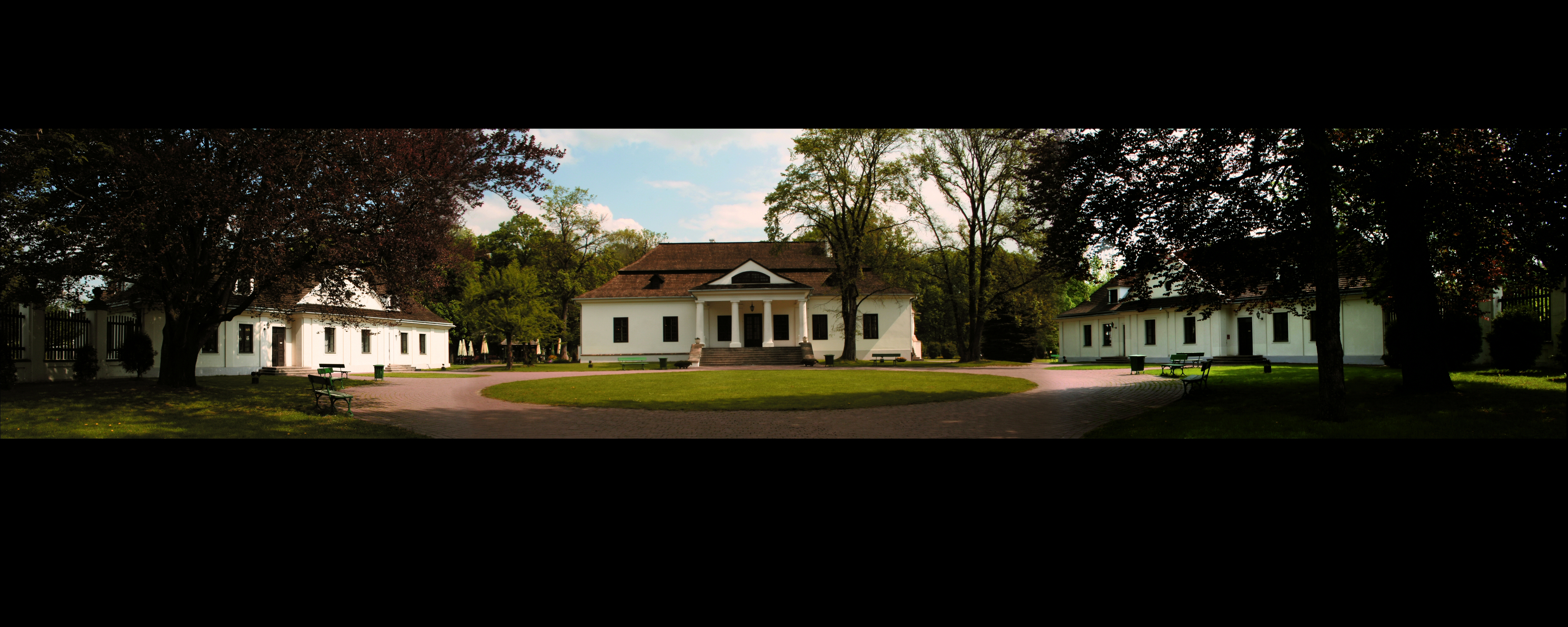 photo: Radosław Molski